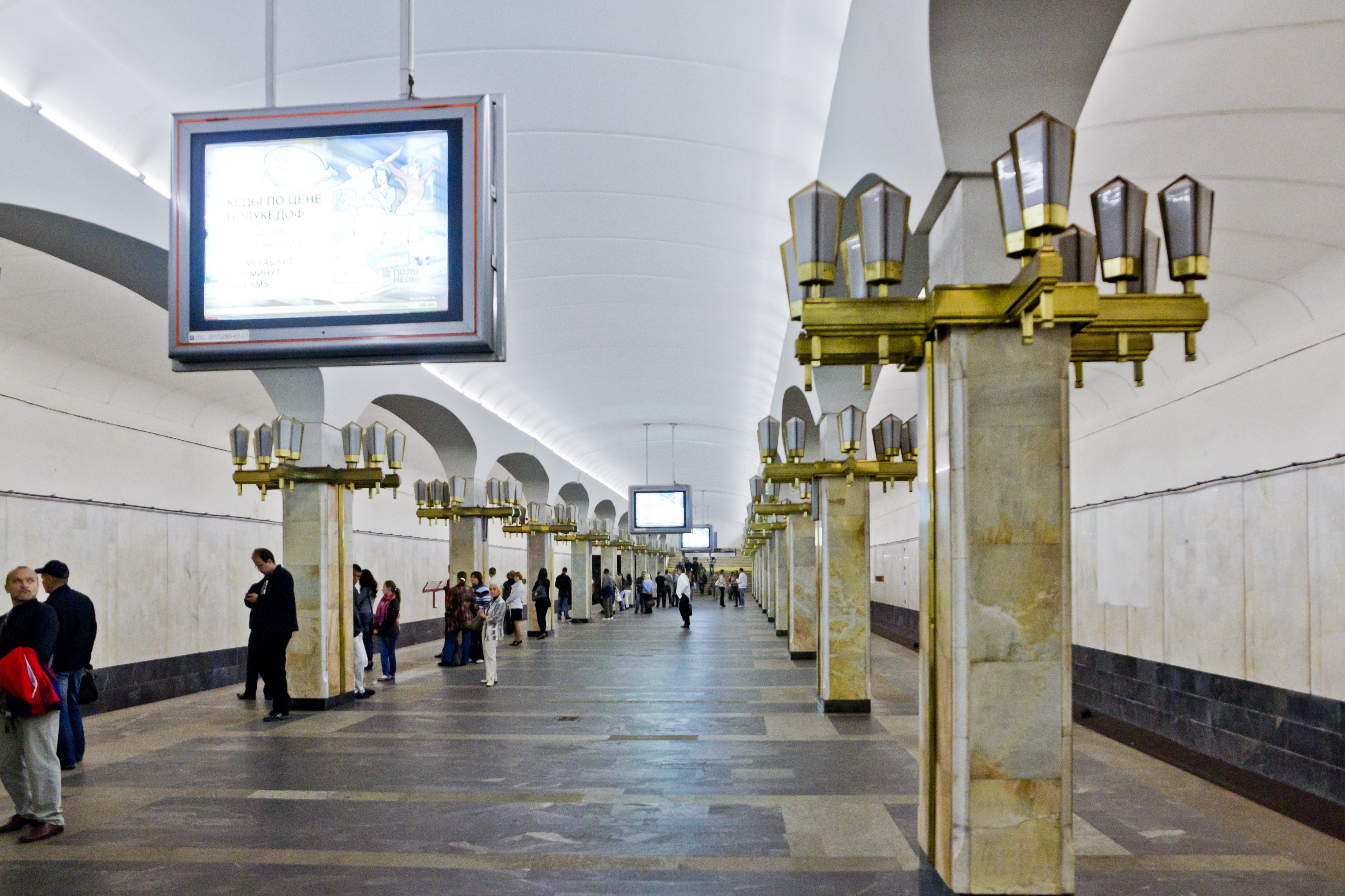 Станция метро «Пушкинская», Минск